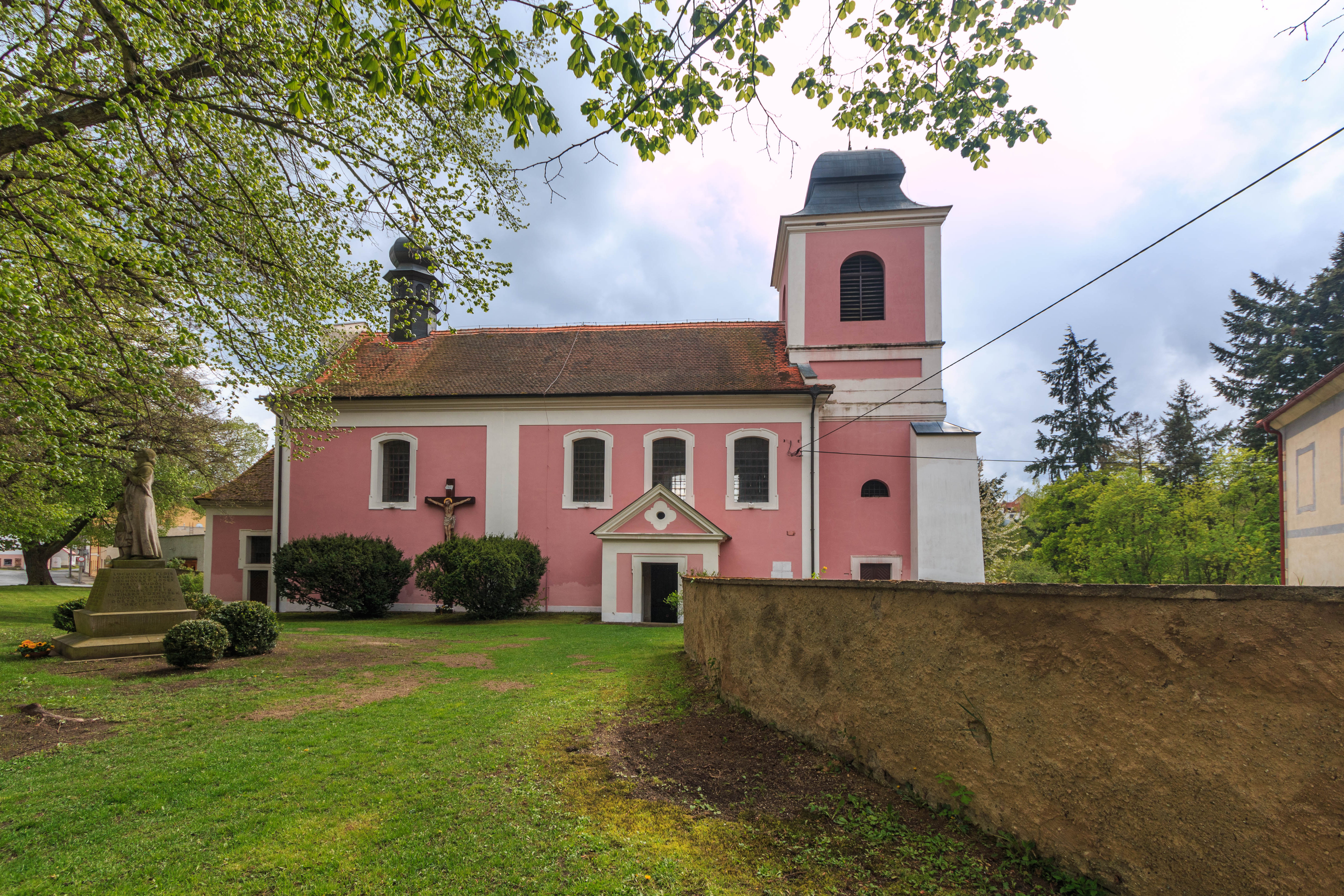 Kostel svatého Martina, náves, Zbečno. Project: Chráněná území.